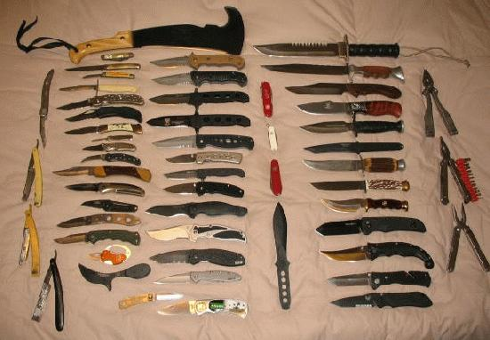 private Messersammlung